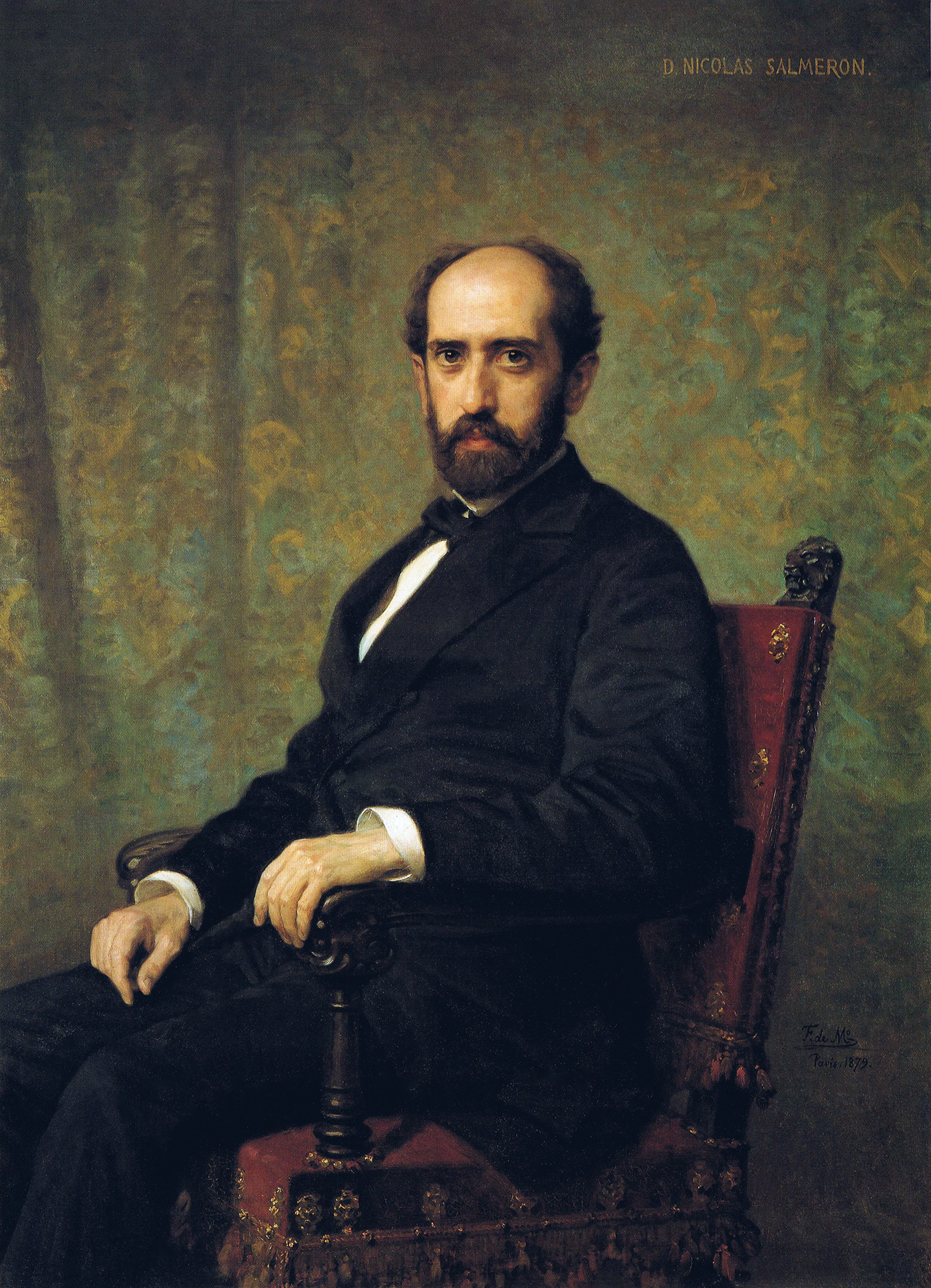 Retrato del político español Nicolás Salmerón (1838-1908), que fue uno de los cuatro presidentes de la Primera República Española.